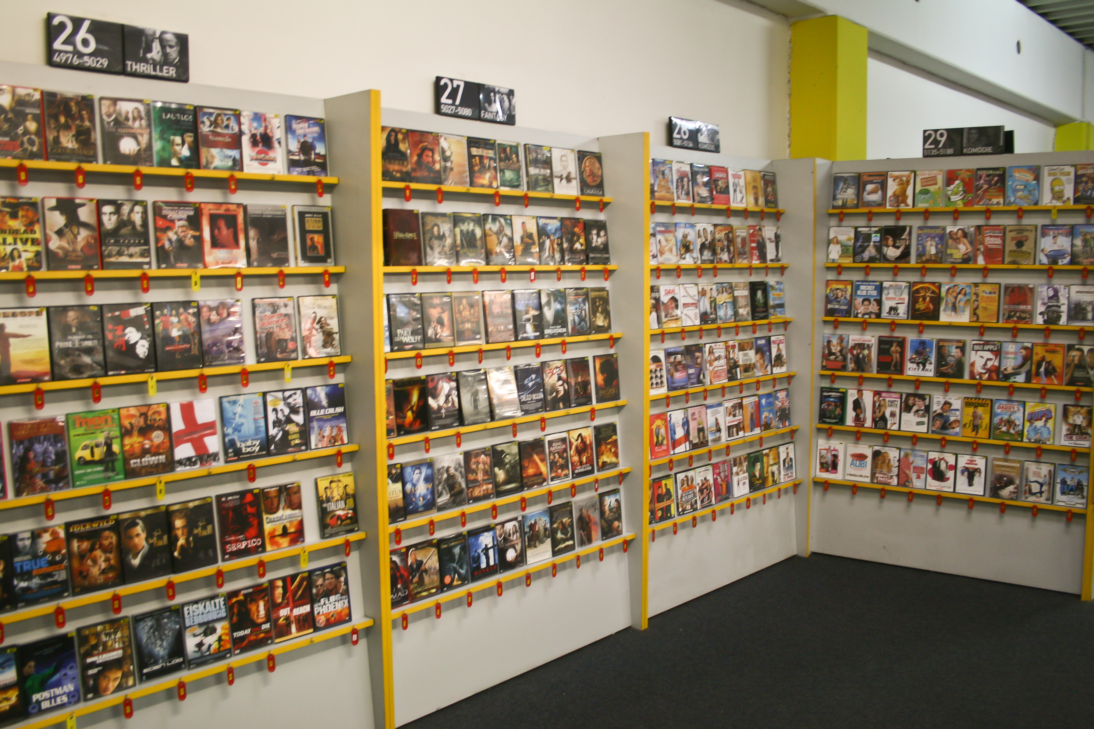 Innenraum einer Videothek in Salzburg